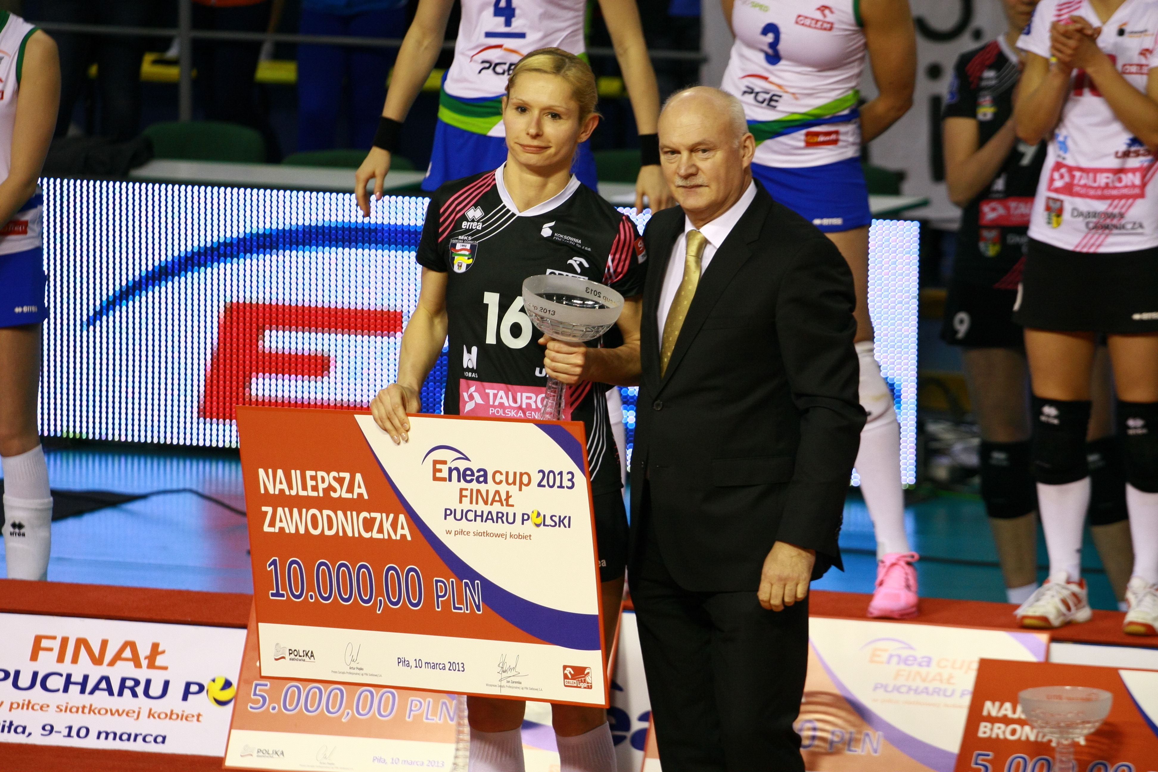 Atom Trefl Sopot Bank BPS Muszynianka Fakro Muszyna Tauron MKS Dąbrowa Górnicza Impel Gwardia Wrocław